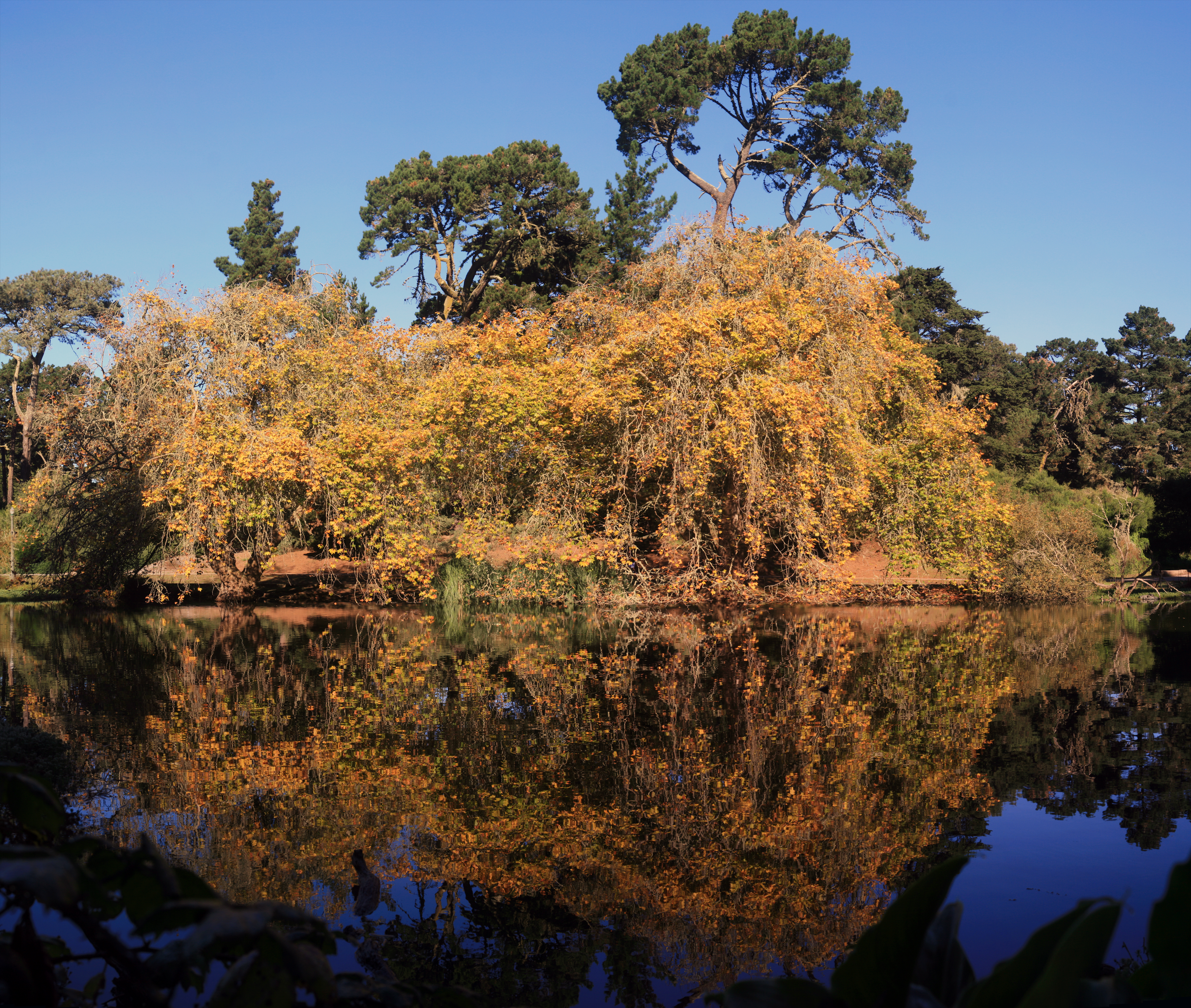 Mallard Lake in Golden Gate Park